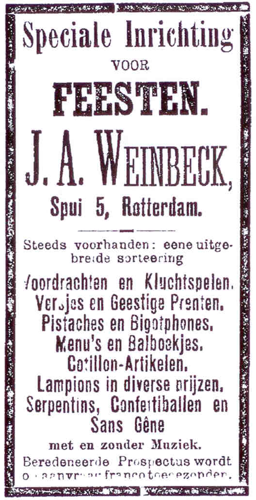 Publicité pour divers articles dont des bigotphones.